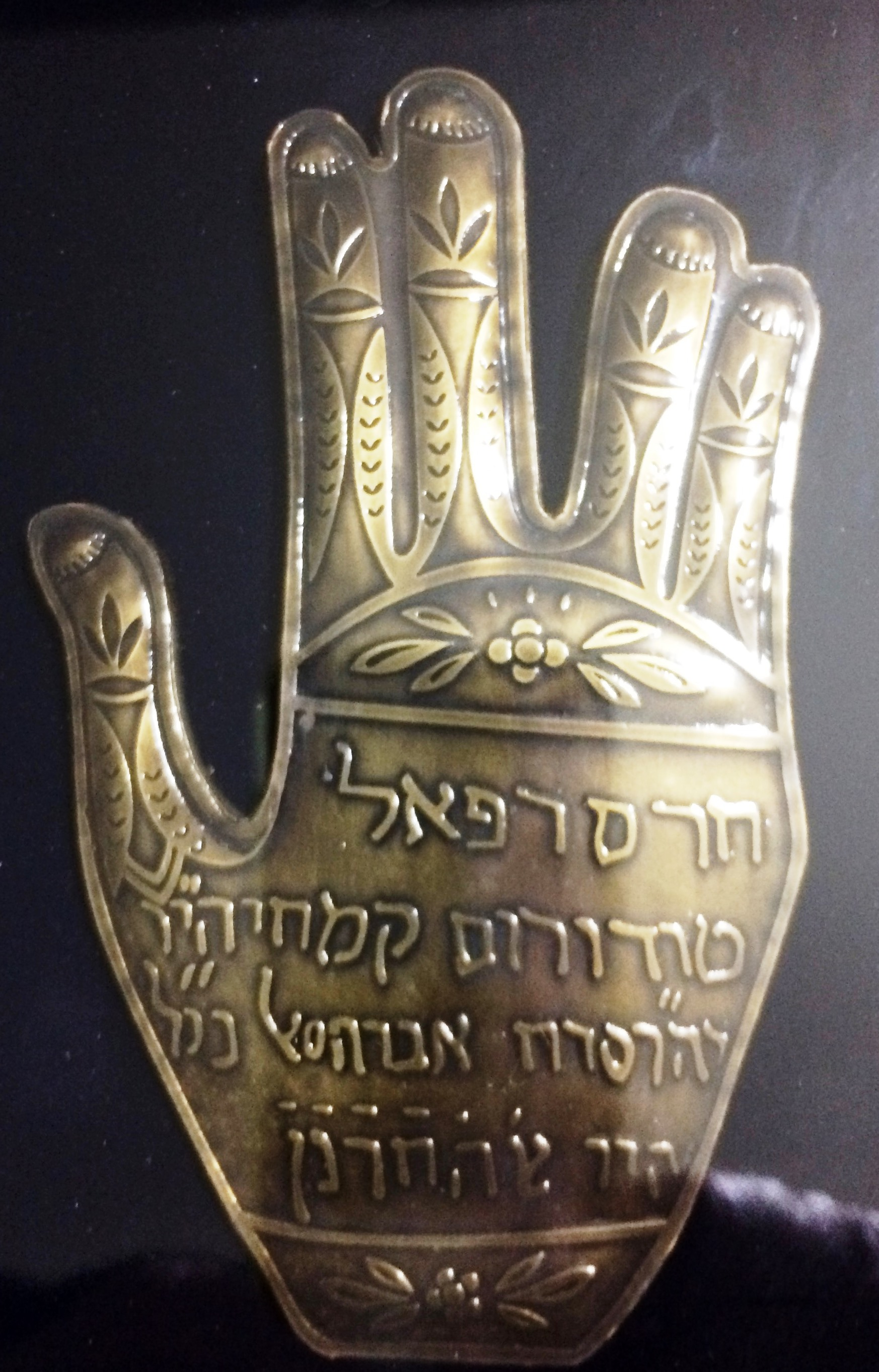 העתק של קמע מכסף בצורה של ברכת הכהנים, שנמצאה בבית הכנסת במונסטיר בסוף המלחמה, עליה כתוב בלאדינו באותיות עיבריות: חרס רפאל תודורוס קמחי, השם ייחידו ויחזקהו, ישמרו השם ויחזקהו, פרח אברהם כנל 5657 לבריאת העולם. 1896